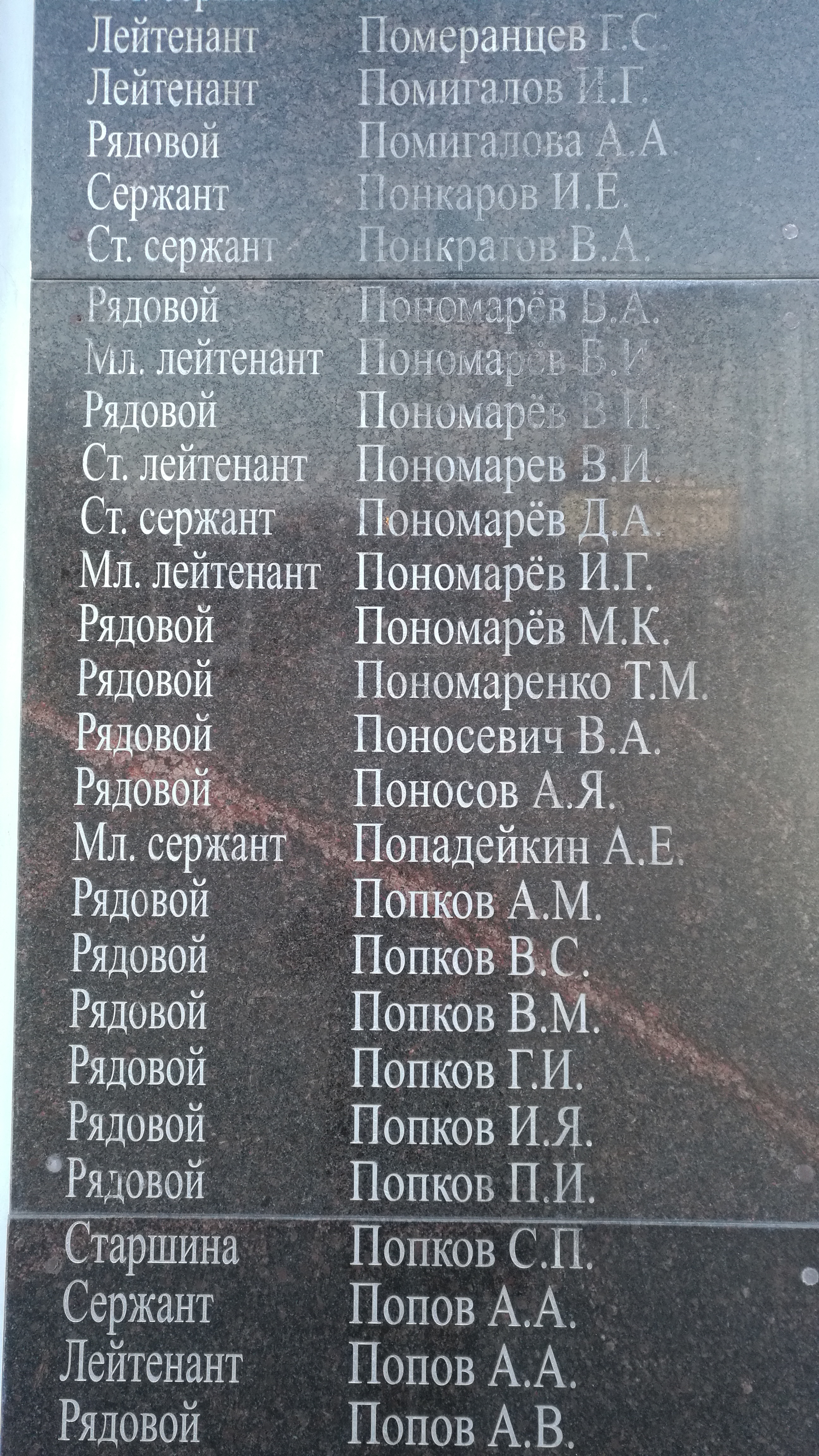 Memorialo de la Dua mondmilito en Placo de Memoro. Tjumeno, Rusio.